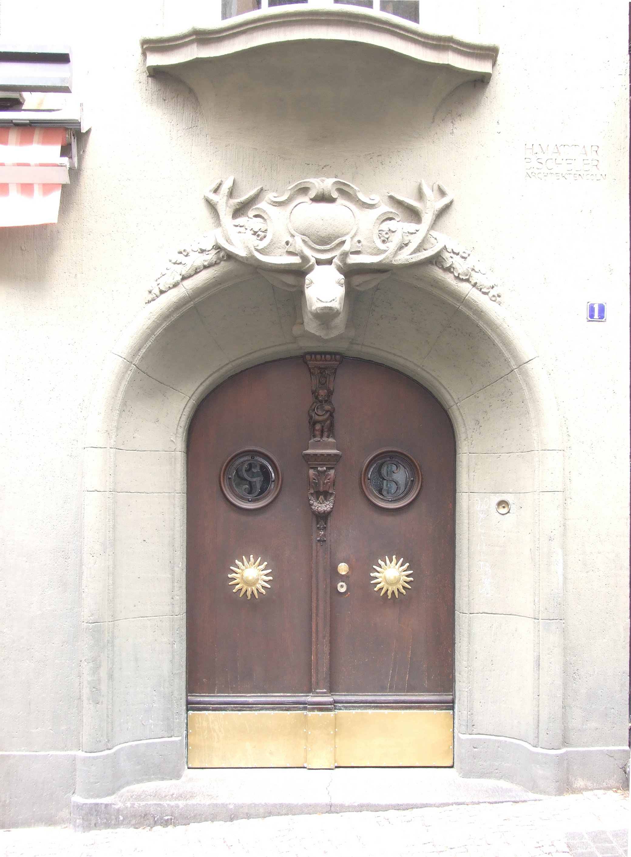 Denkmalgeschütztes Wohn- und Geschäftshaus, Rheinstraße 1, Linz am Rhein: Eingang